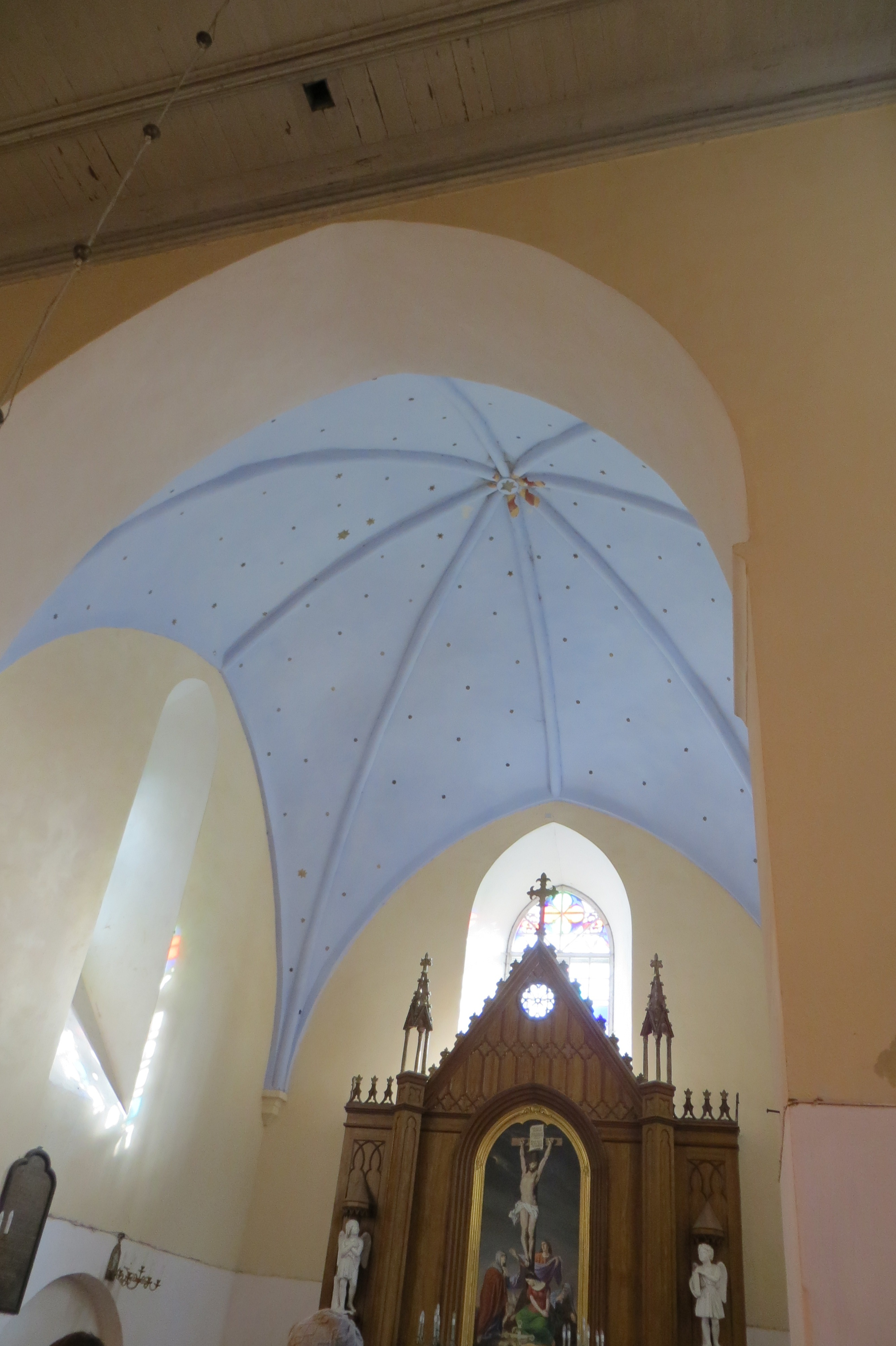 Domikaalvõlv Paistu kirikus